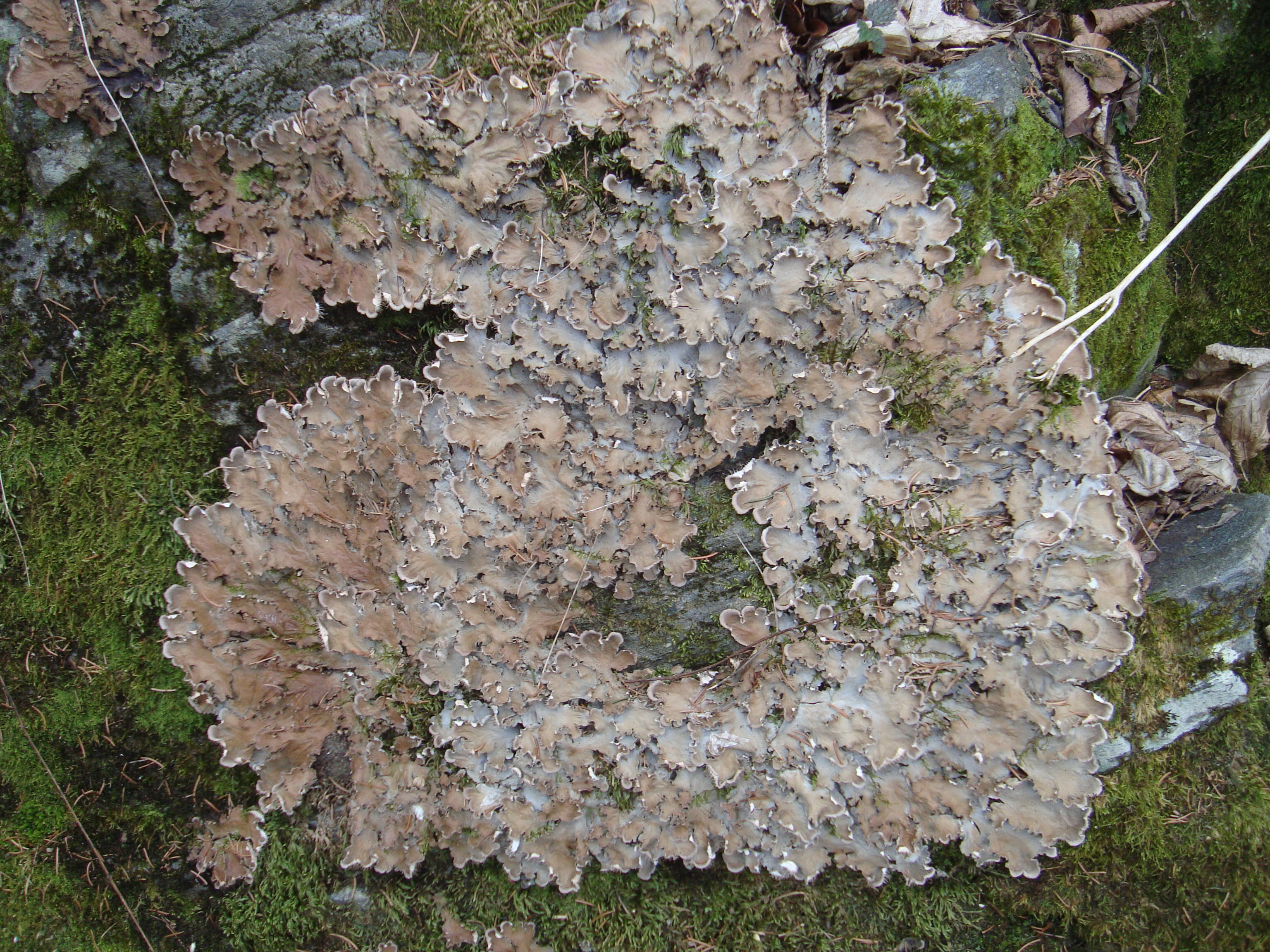 Hávnatka obetkaná - Obrovský lišejník z údolí Chvojnice